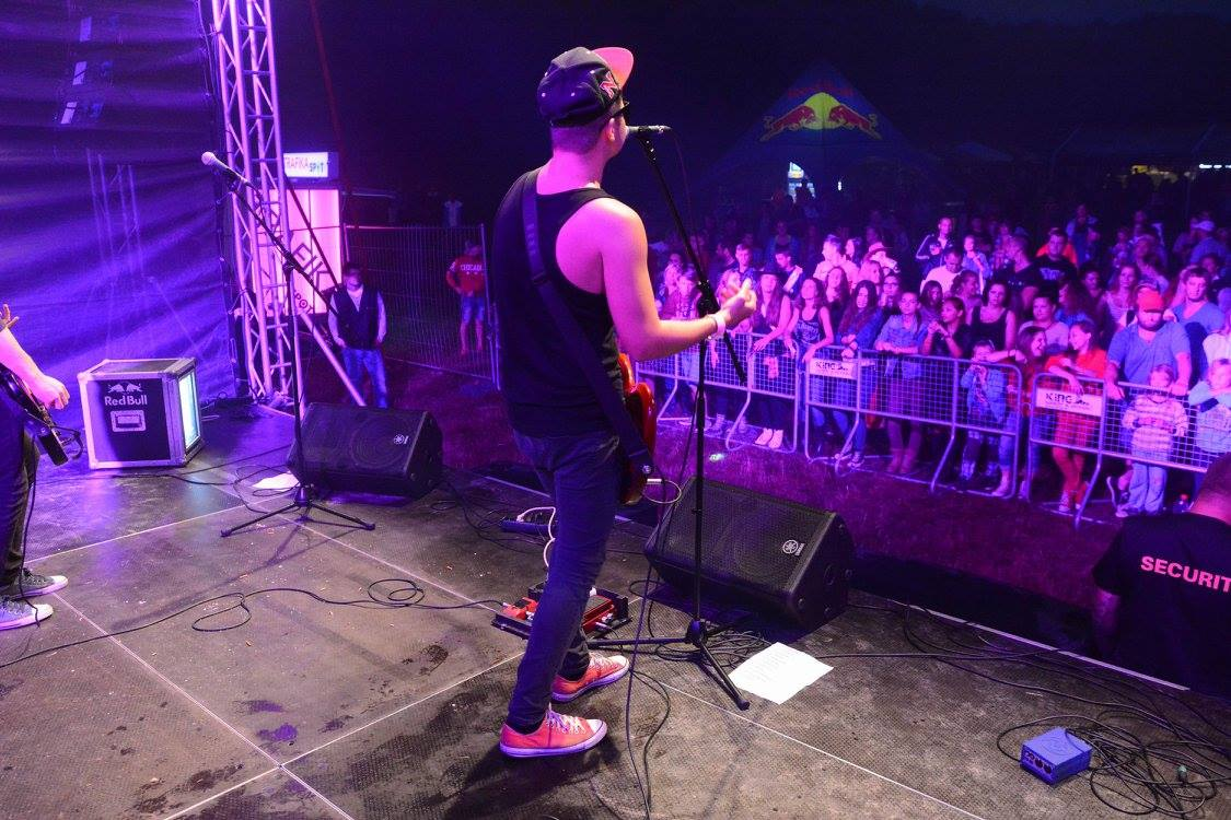 Live 2015